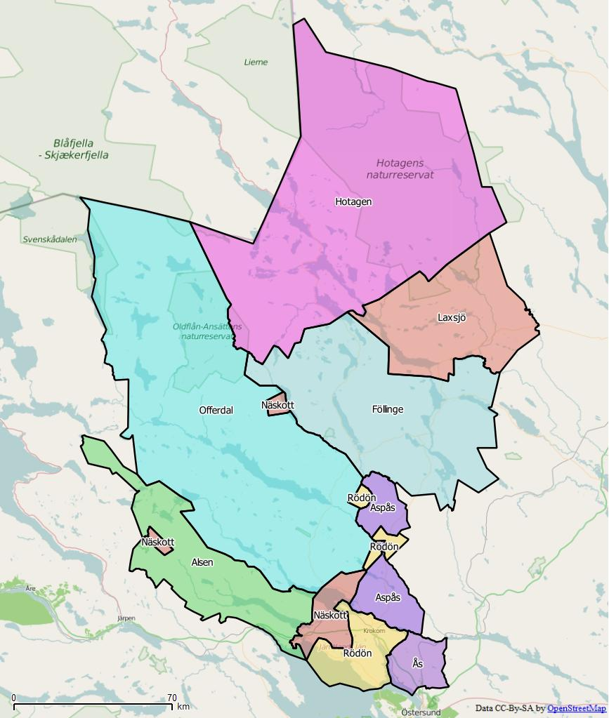 Distriktsindelningen i Krokoms kommun World file: 310.99095741146675209 0 0 -310.99095741146675209 1442924.27508828463032842 9459655.98855736665427685